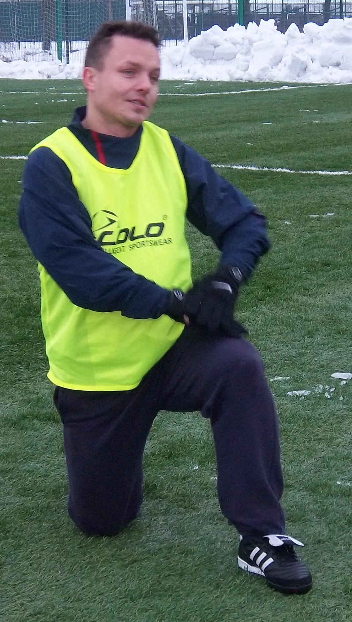 Zdjęcie zawodnika: Grzegorz Skwara (8 stycznia 2011)